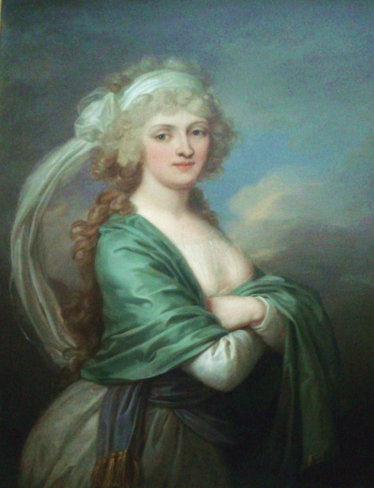 Antonina Eleonora Ilińska z Komorowskich